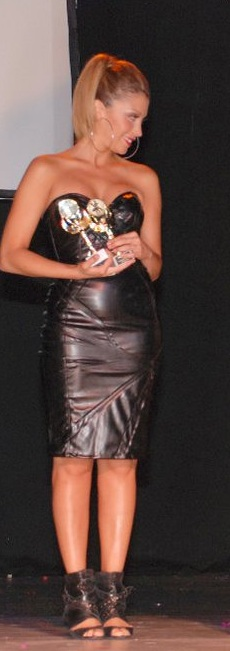 Yamna Lobos en la gala de la academia de Rodrigo Díaz